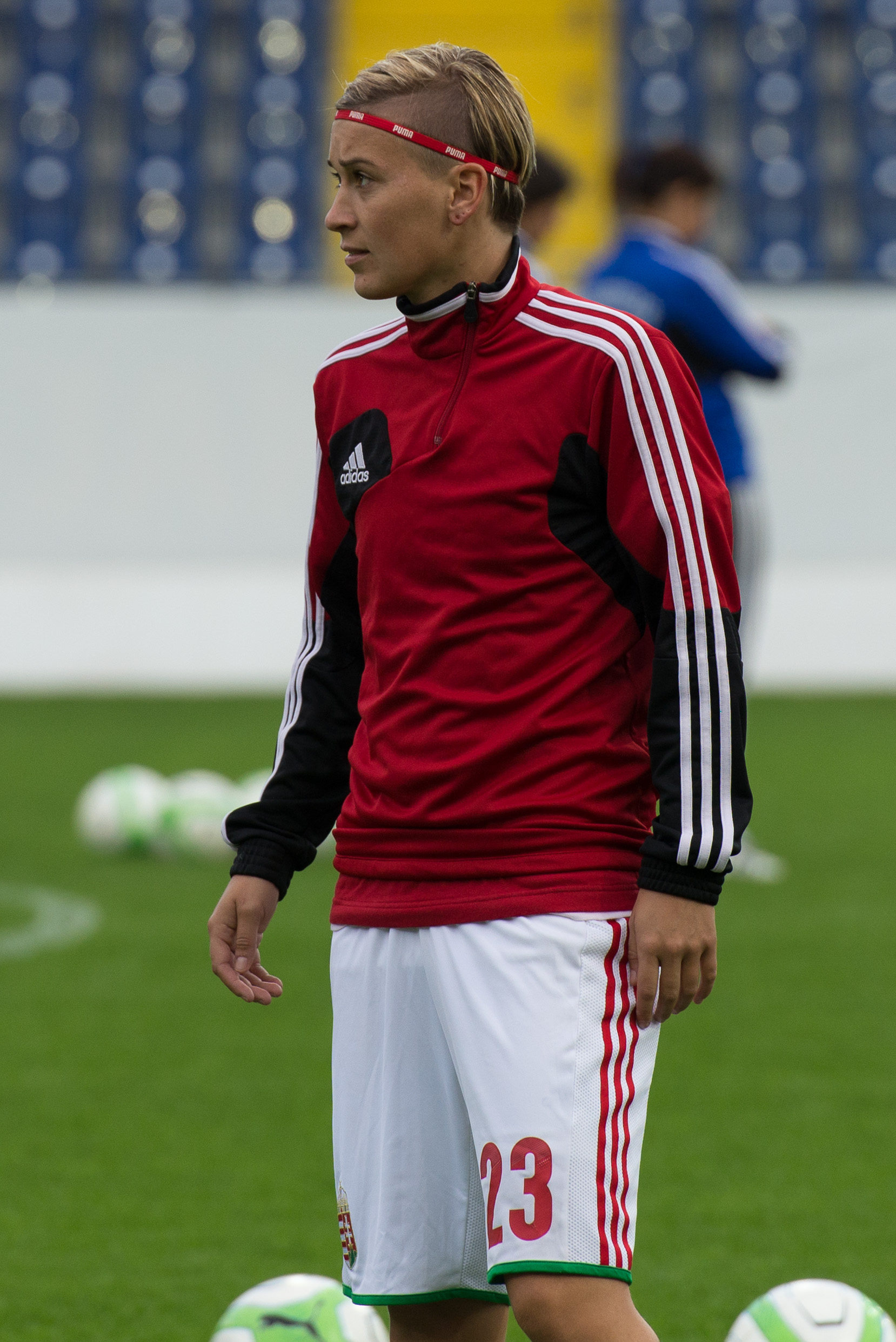 FIFA Women's World Cup 2015: Qualifying Round St. Pölten, 13.09.2014 Erika Szuh